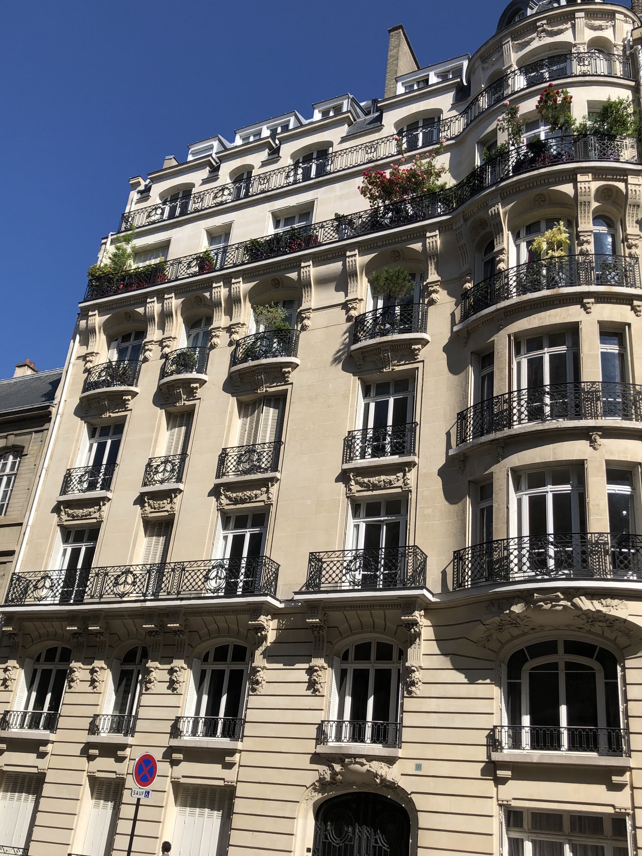 Immeuble néo-classique début du XXème siècle par Charles Adda, au16 rue Ampère